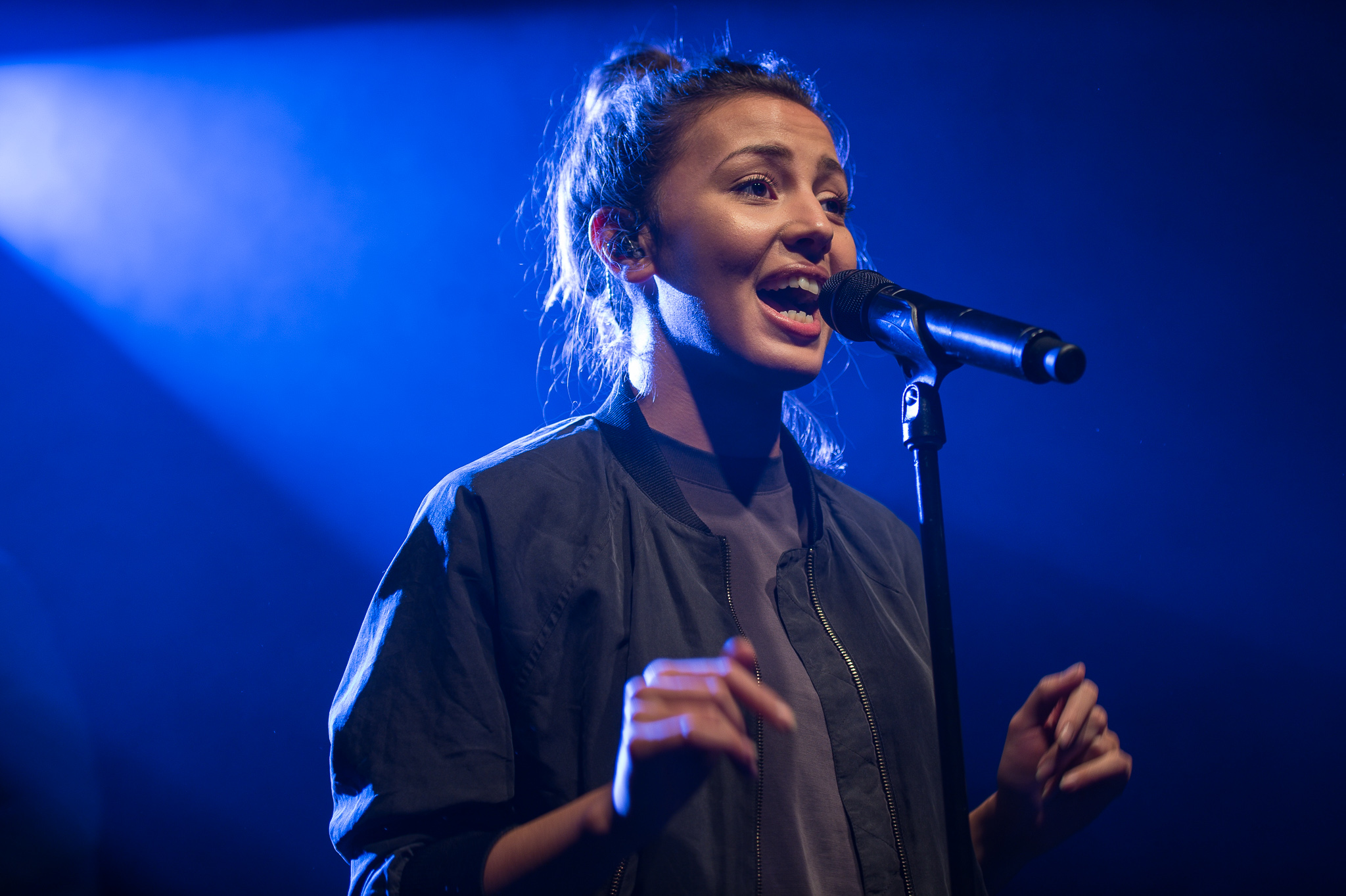 Concertbüro Franken,Der Hirsch,Konzert,Livekonzert,Livemusik,Musik,Namika